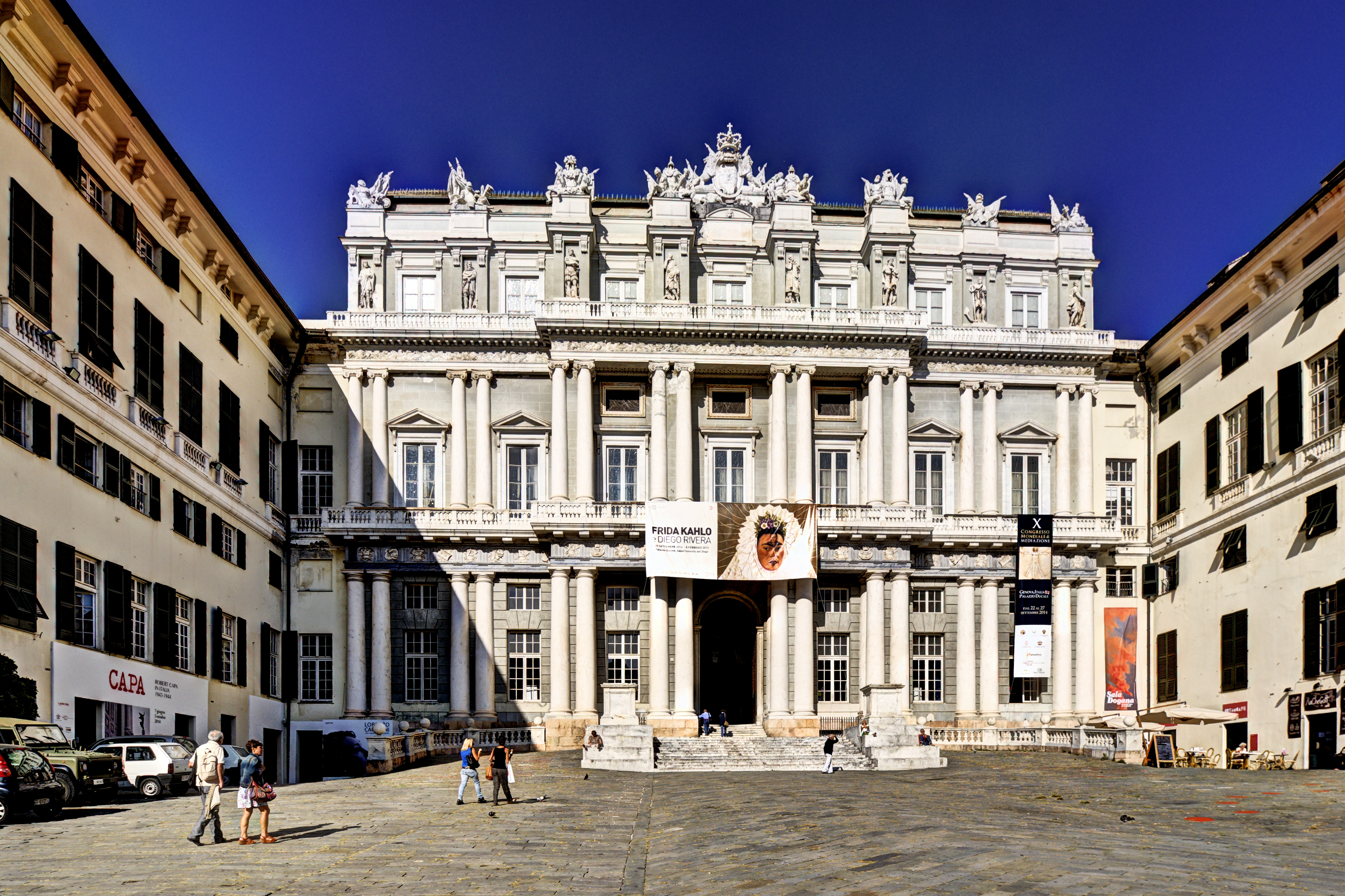 Palazzo Ducale di Genova This is a photo of a monument which is part of cultural heritage of Italy.